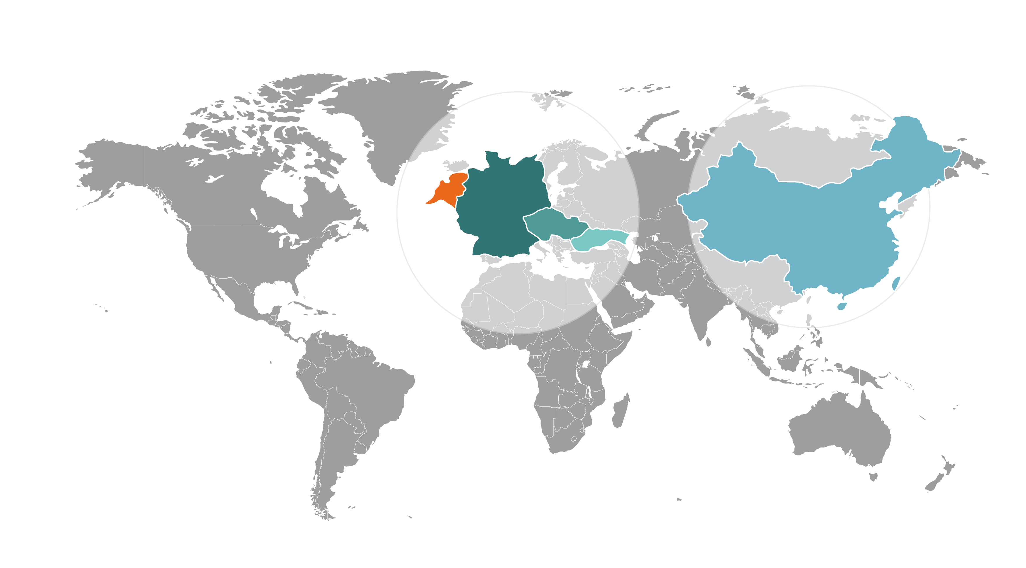 Neways locations in Europe, Asia and the United States